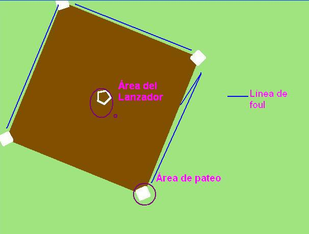 Diamante de Kickball